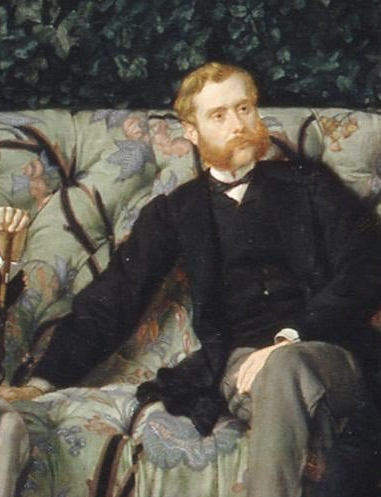 detail: Baron Rodolphe Hottinguer